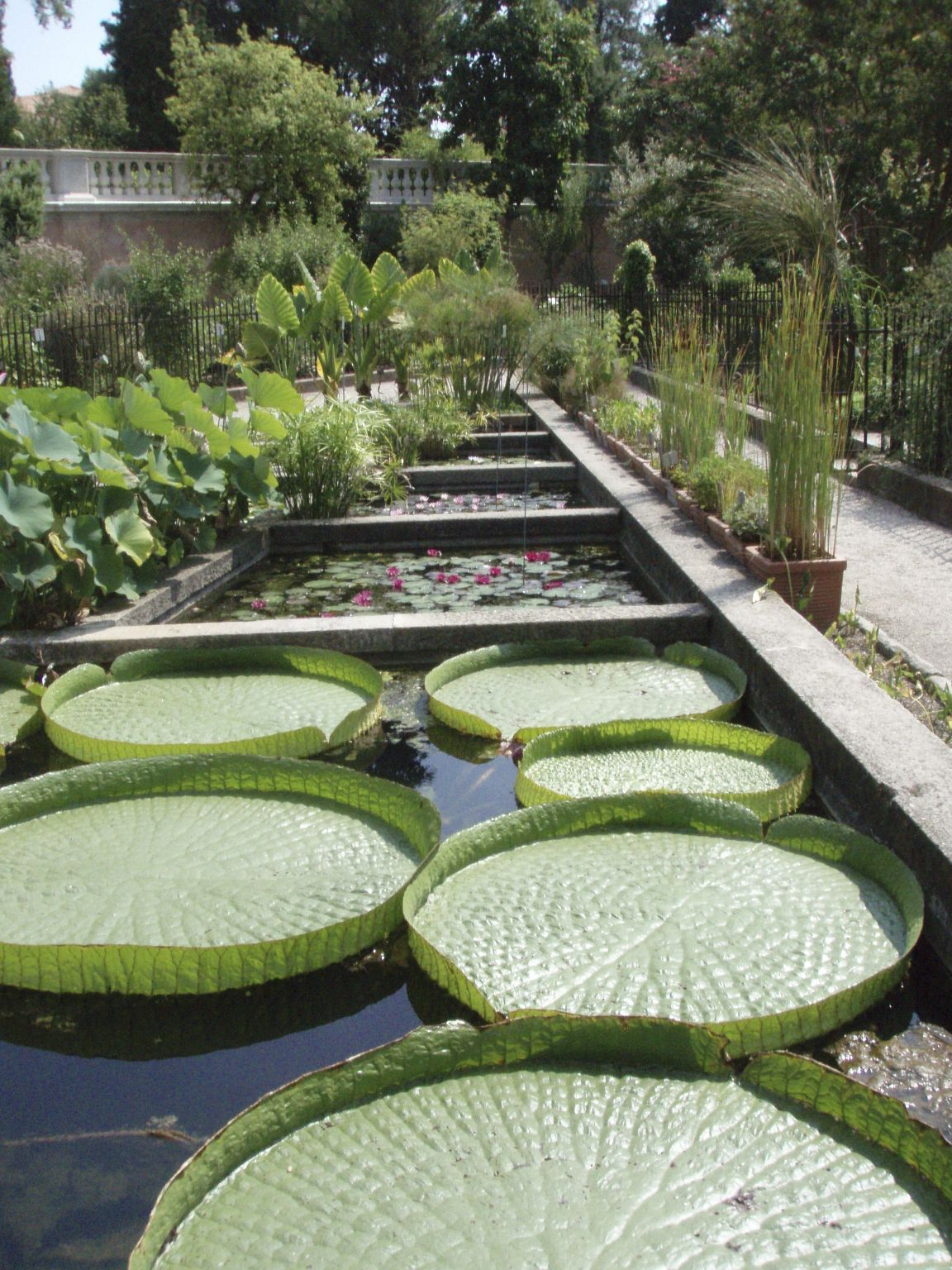 Botanical garden Padova